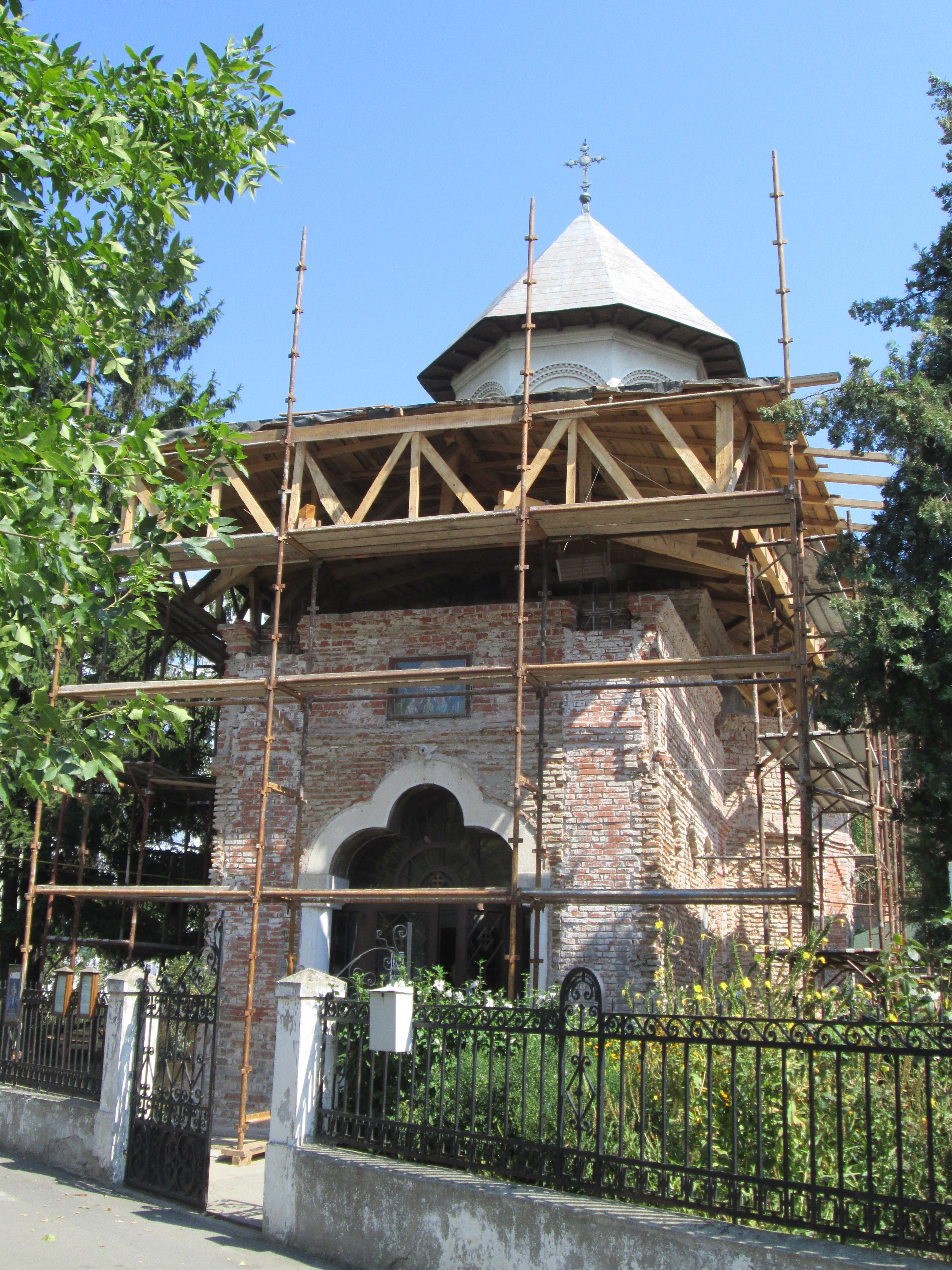 Biserica „Sf. Sofia“ - Floreasca